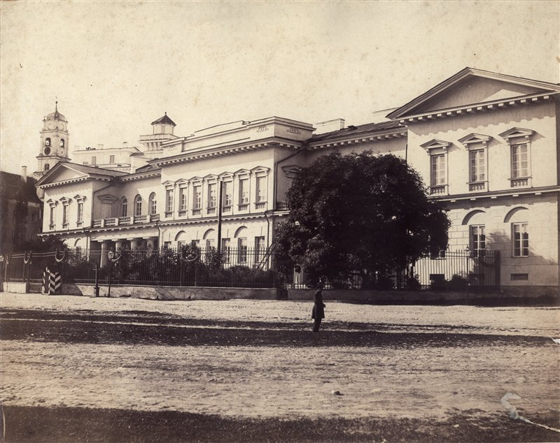 Vilniaus generalgubernatūros rūmai. XIX a. 8 deš. Dabartinė prezidentūra.